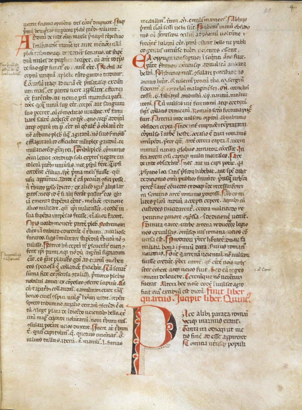 Livius, Ab urbe condita, Handschrift des 13. Jahrhunderts. London, British Library, Harl. 2493, fol. 20r.